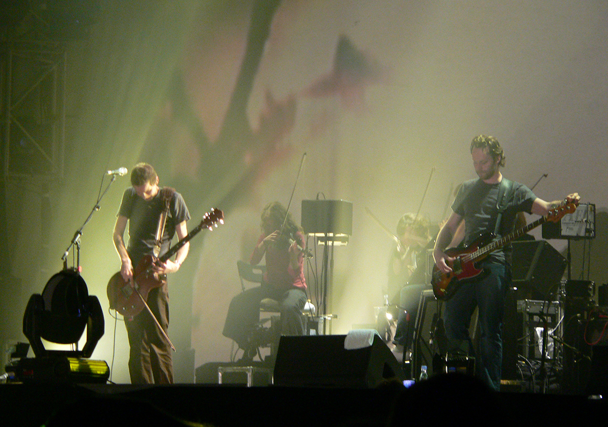 Sigur Rós performing in Roskilde Festival, 2006.